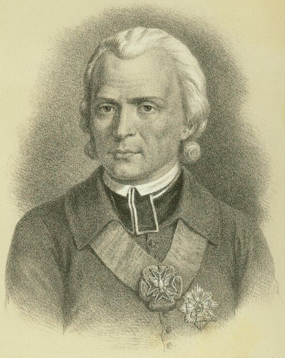 Marcin Odlanicki Poczobutt. Lithograph. 19.5x15.2 cm